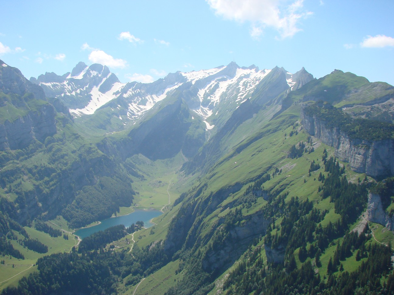 Säntis-Nord-Panorama